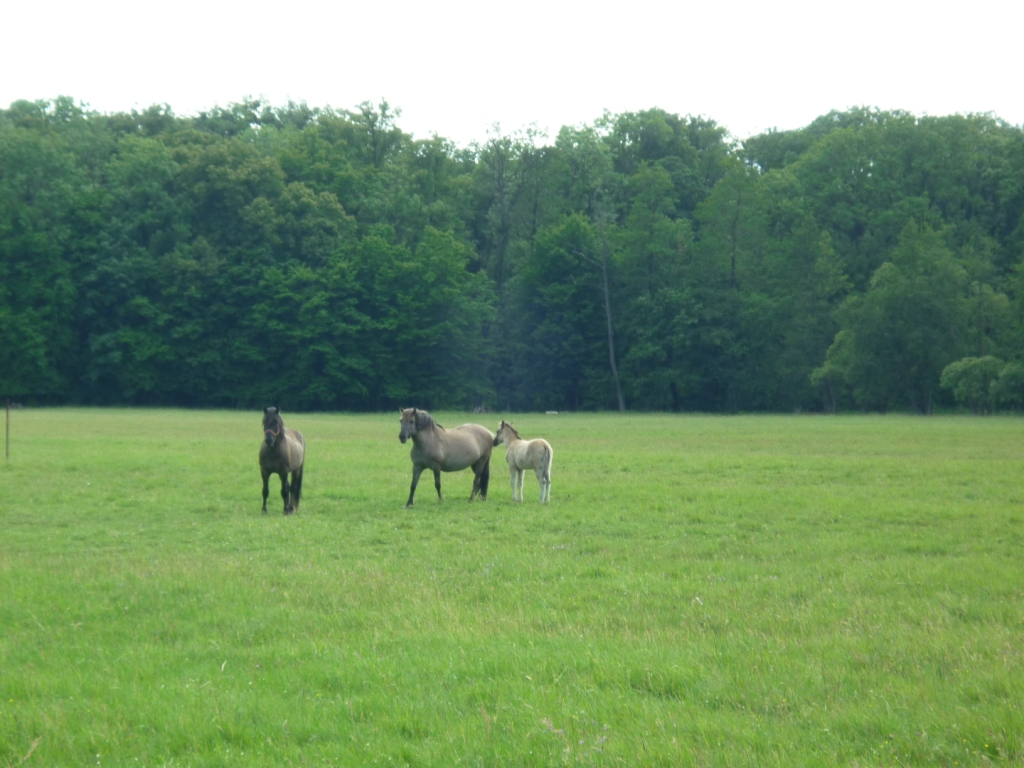 Konie w Dolinie Bystrzycy (Okolice Jarnołtowa)